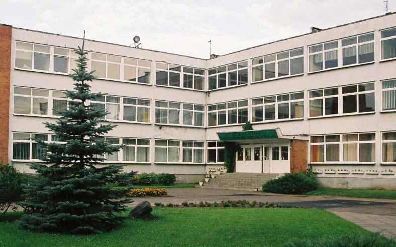 Atžalyno vid. mokykla.